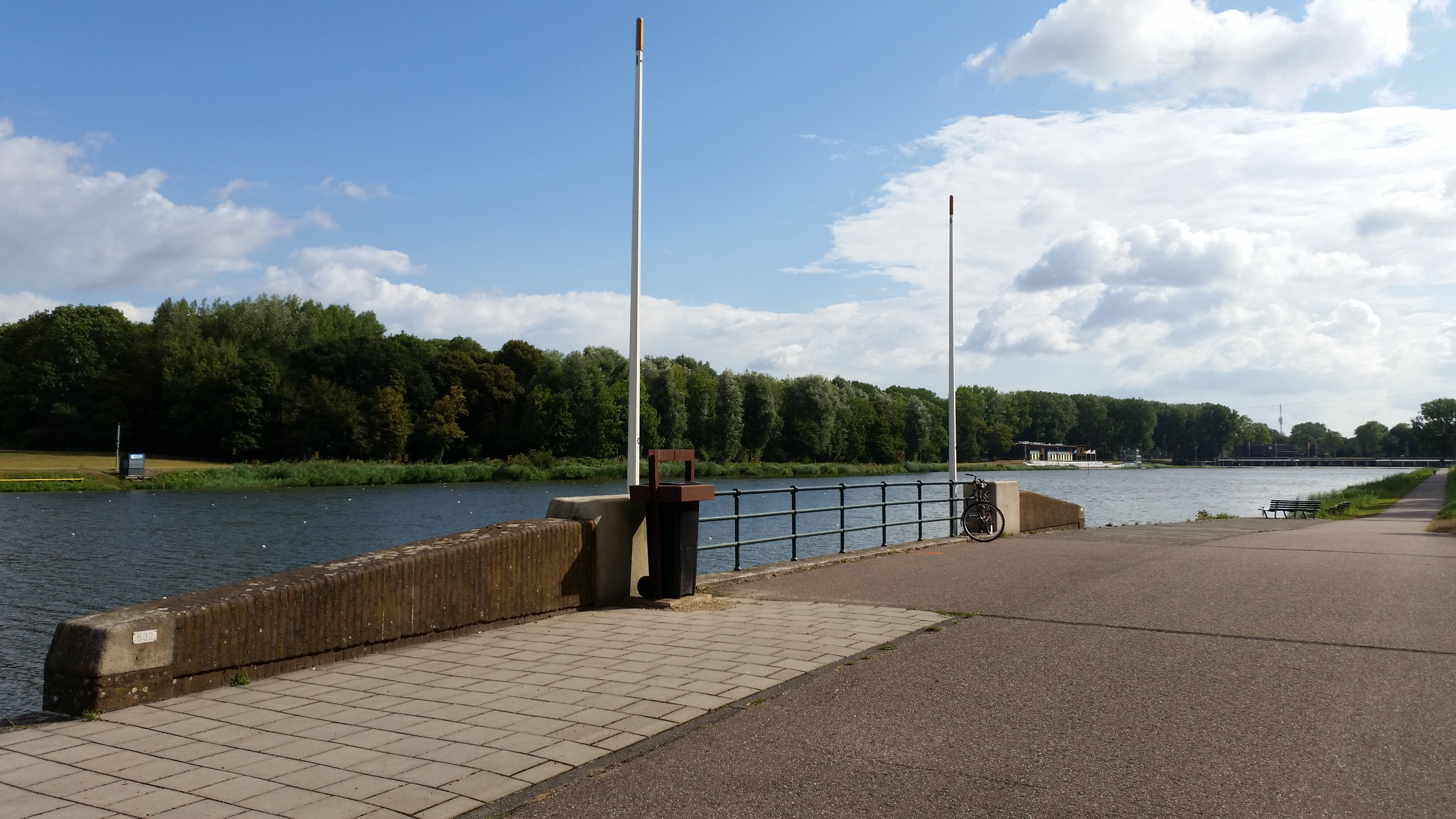 Brug 532 (in Amsterdam) aan Bosbaankant